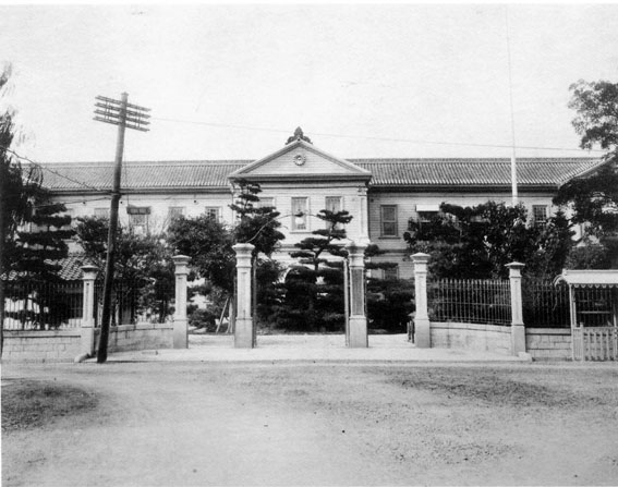 香川県高松市内町にあった初代香川県庁。